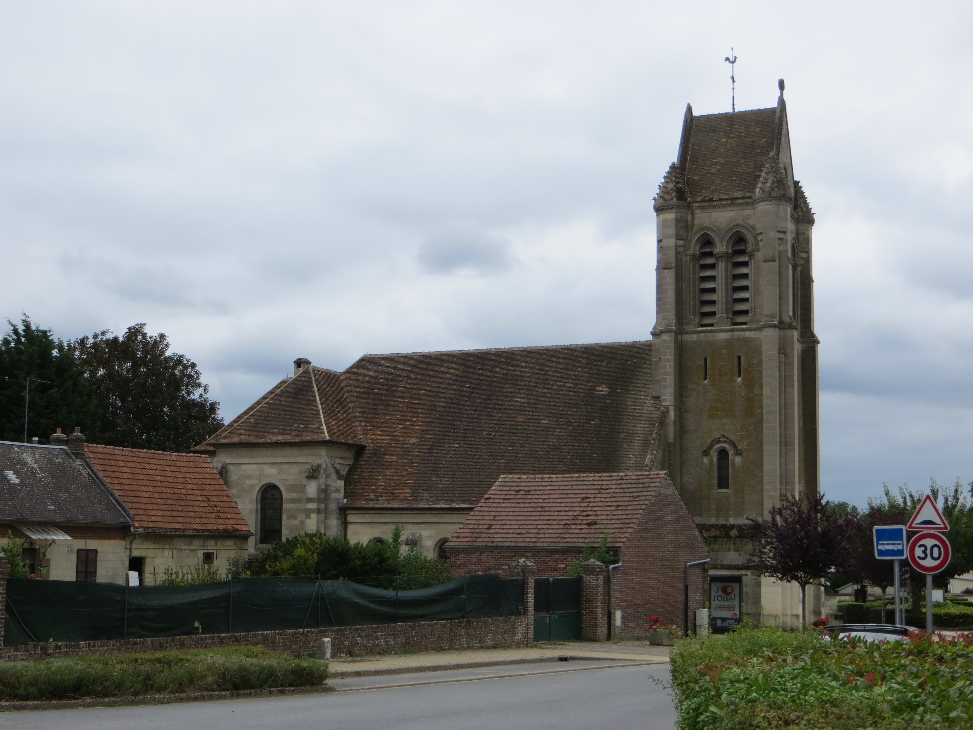 Vue générale de l'église